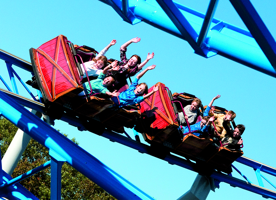 Tyfoon